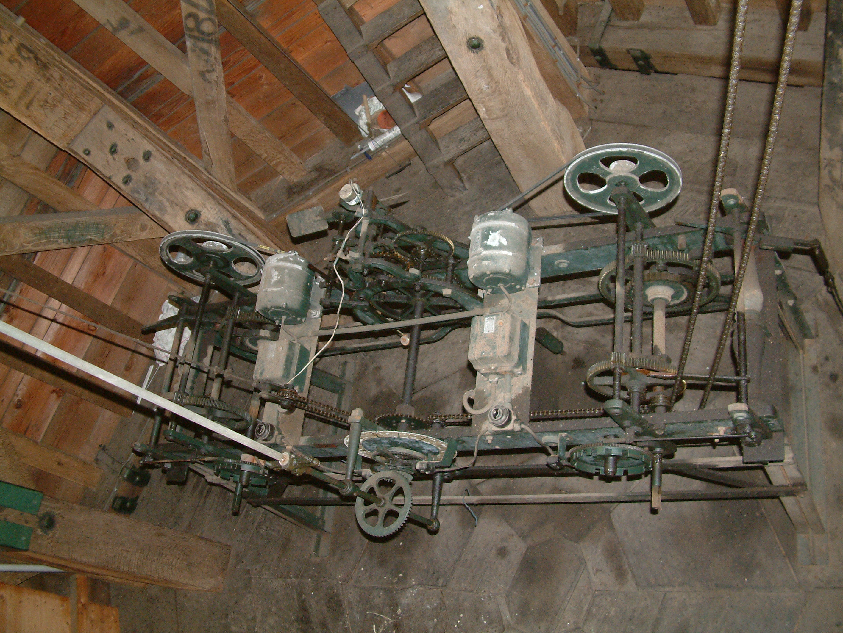 Oude kerk Zoetermeer